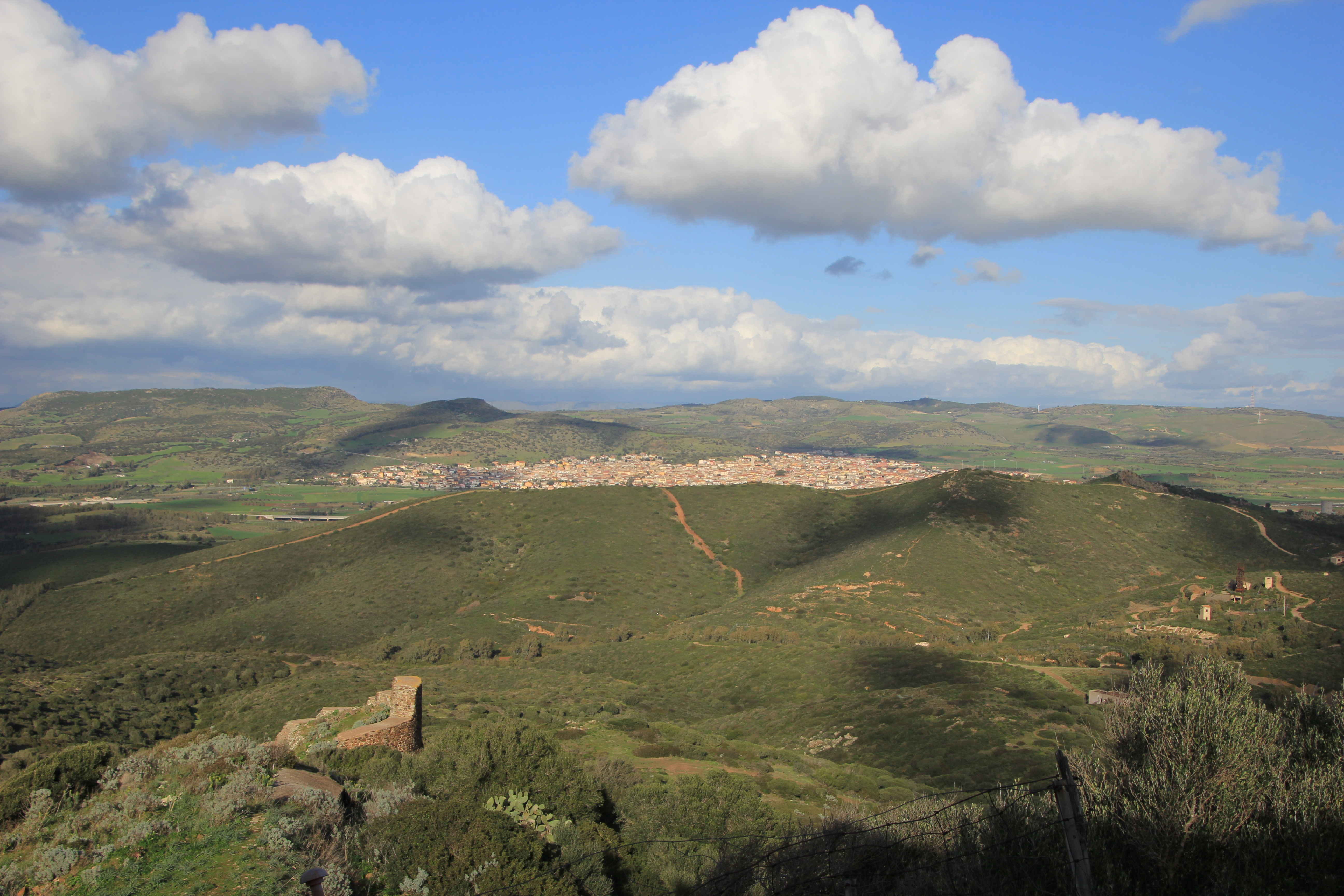 Sardara - Panorama